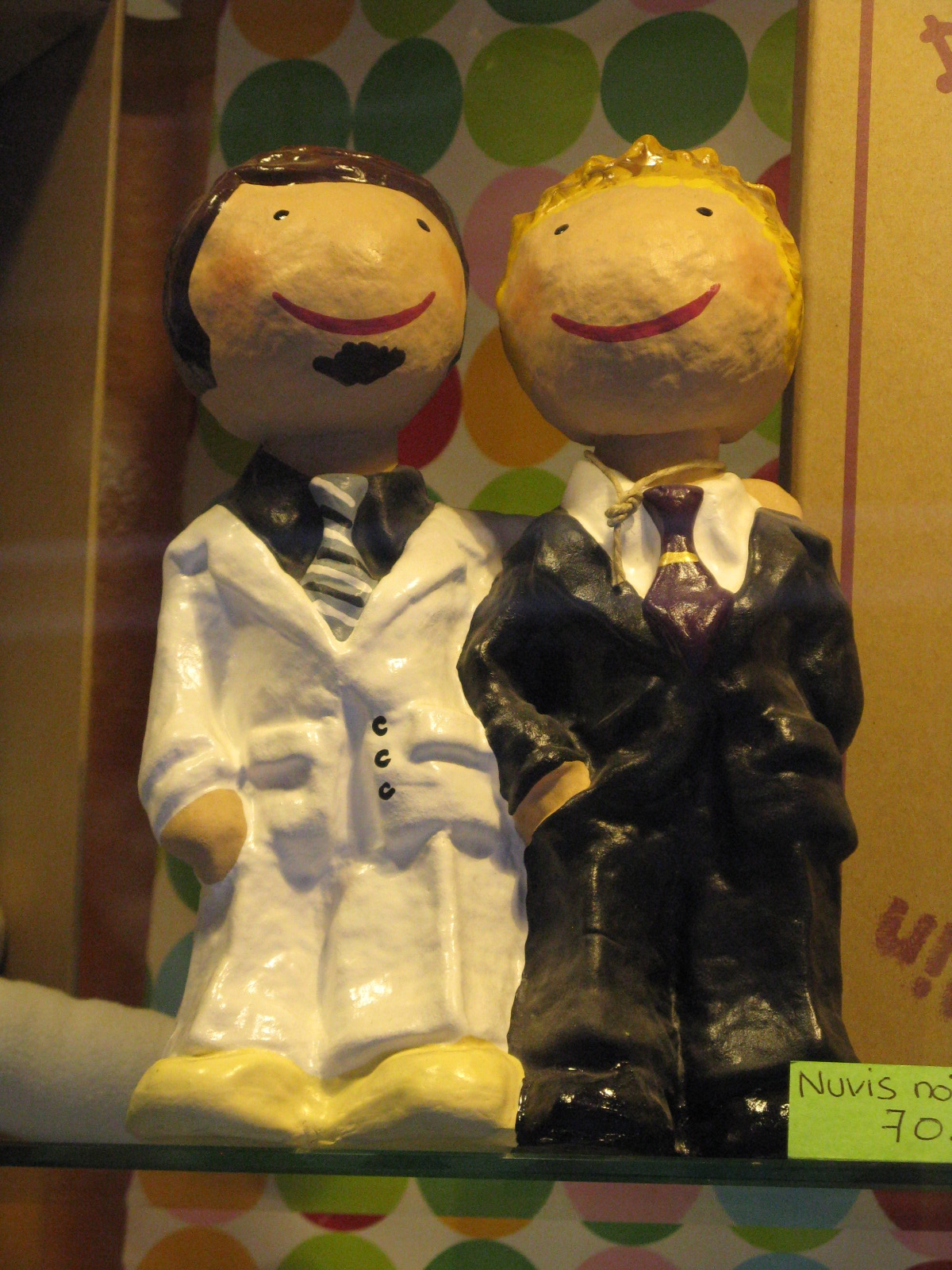 Dopo l'approvazione della legge che regola i matrimoni tra persone dello stesso sesso, in Spagna, si assiste al cambiamento della società